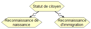 Composition de principes en MOT